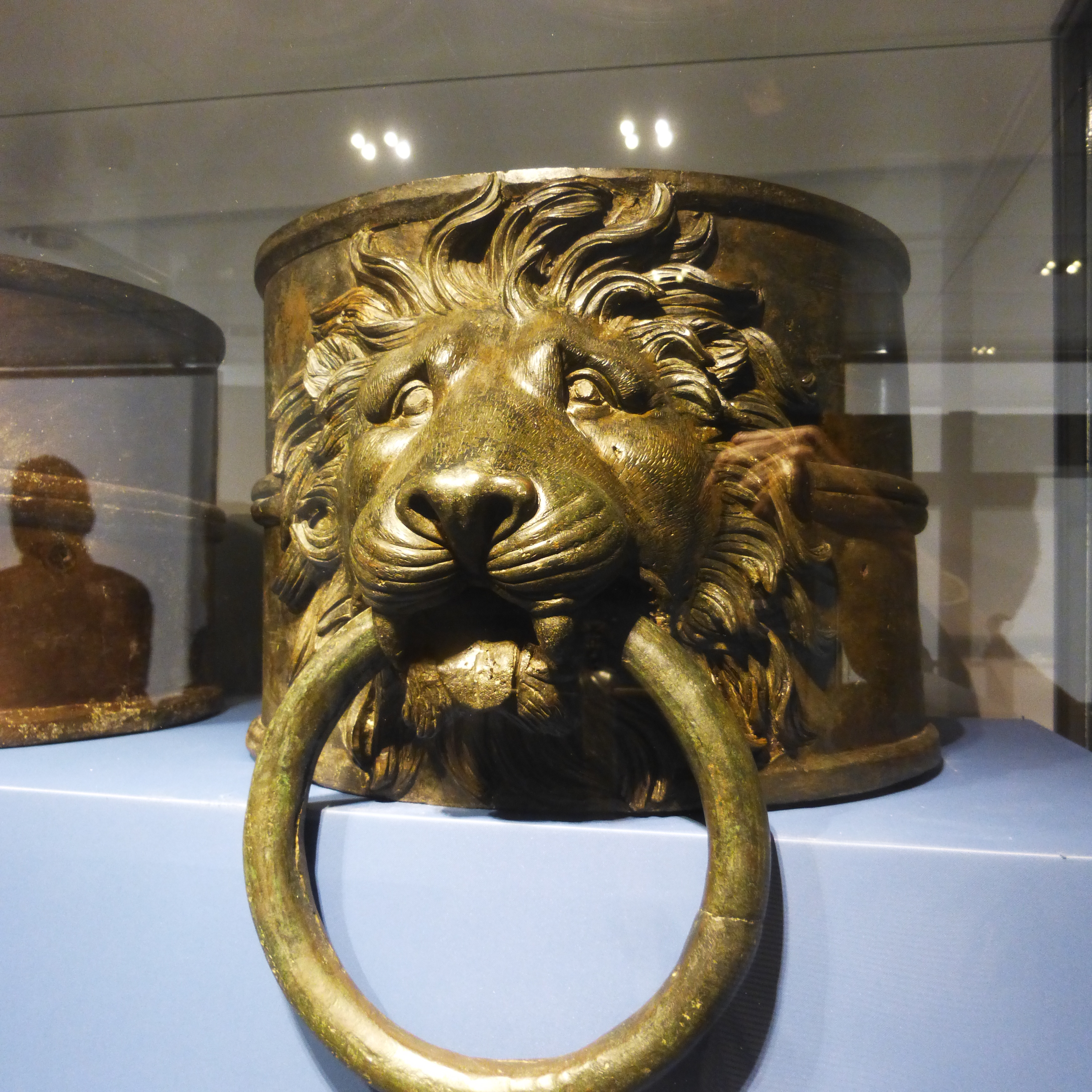 Roma, Palazzo Massimo alle Terme, ghiera di timone con protome leonina dalla prima nave, rinvenuta nel 1929. Num.cat. 226.